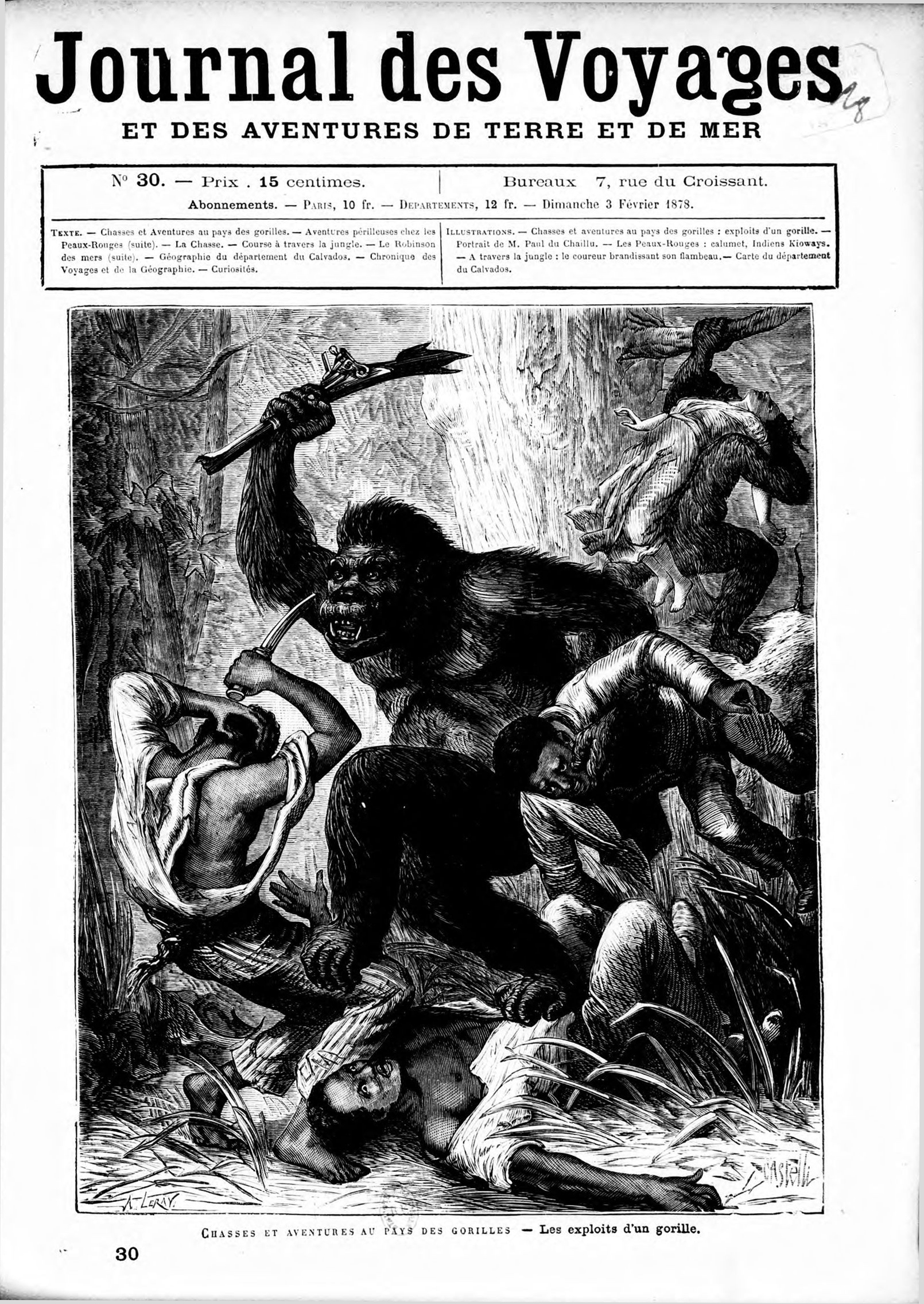 Couverture du numéro comportant le premier chapitre des Voyages de Du Chaillu.